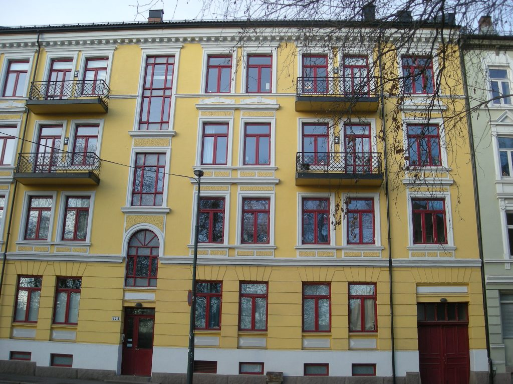 Akersbakken 25E, like ved Gamle Aker kirke, i Oslo. Arkitekt: Eduard Carlen (1903).